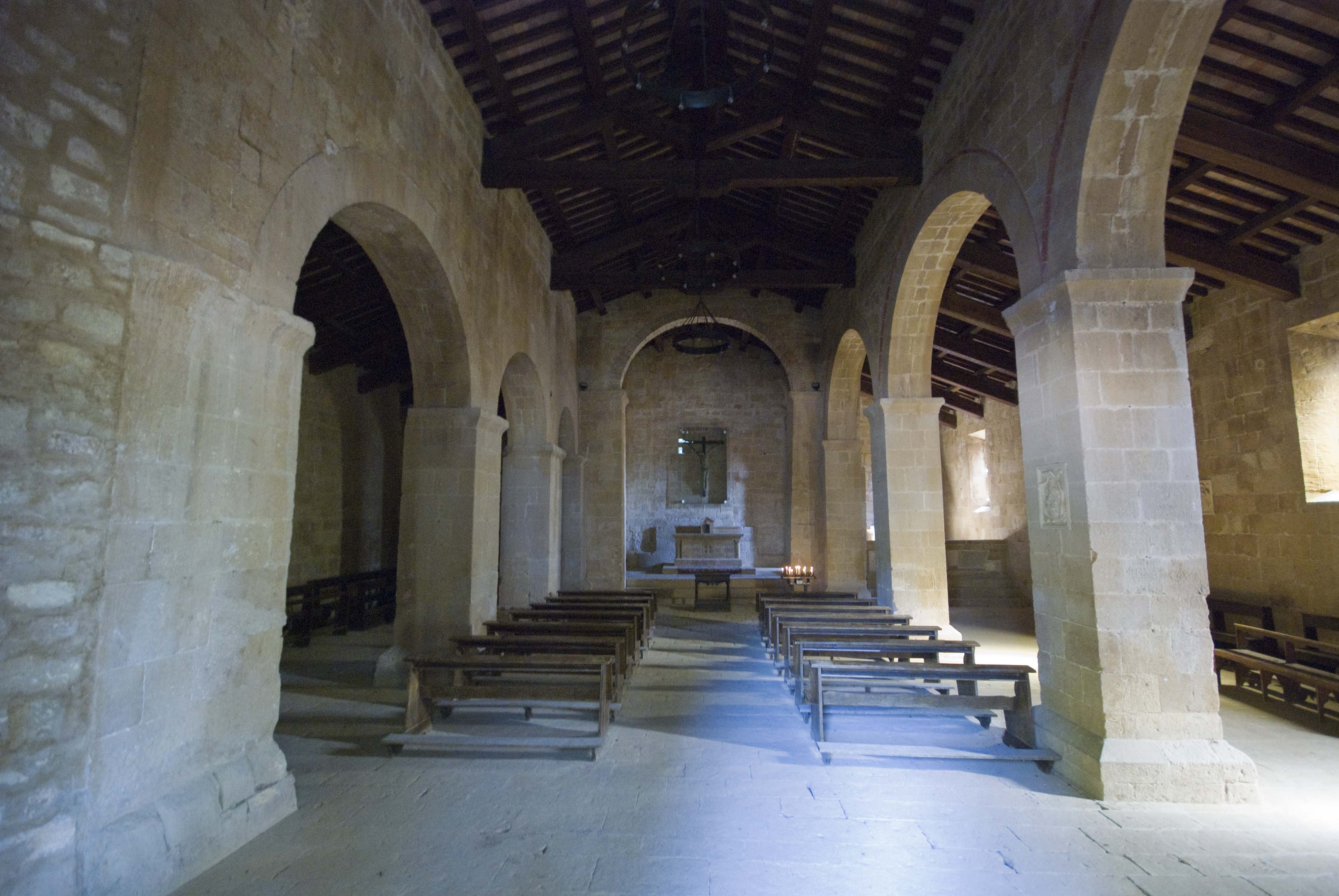 interno della pieve di vito e modesto - Pienza